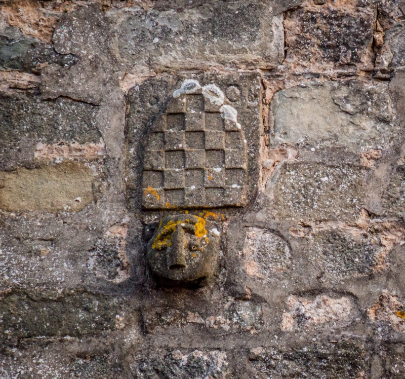 Bassorilievo sul lato nord del campanile della chiesa di San Miniato